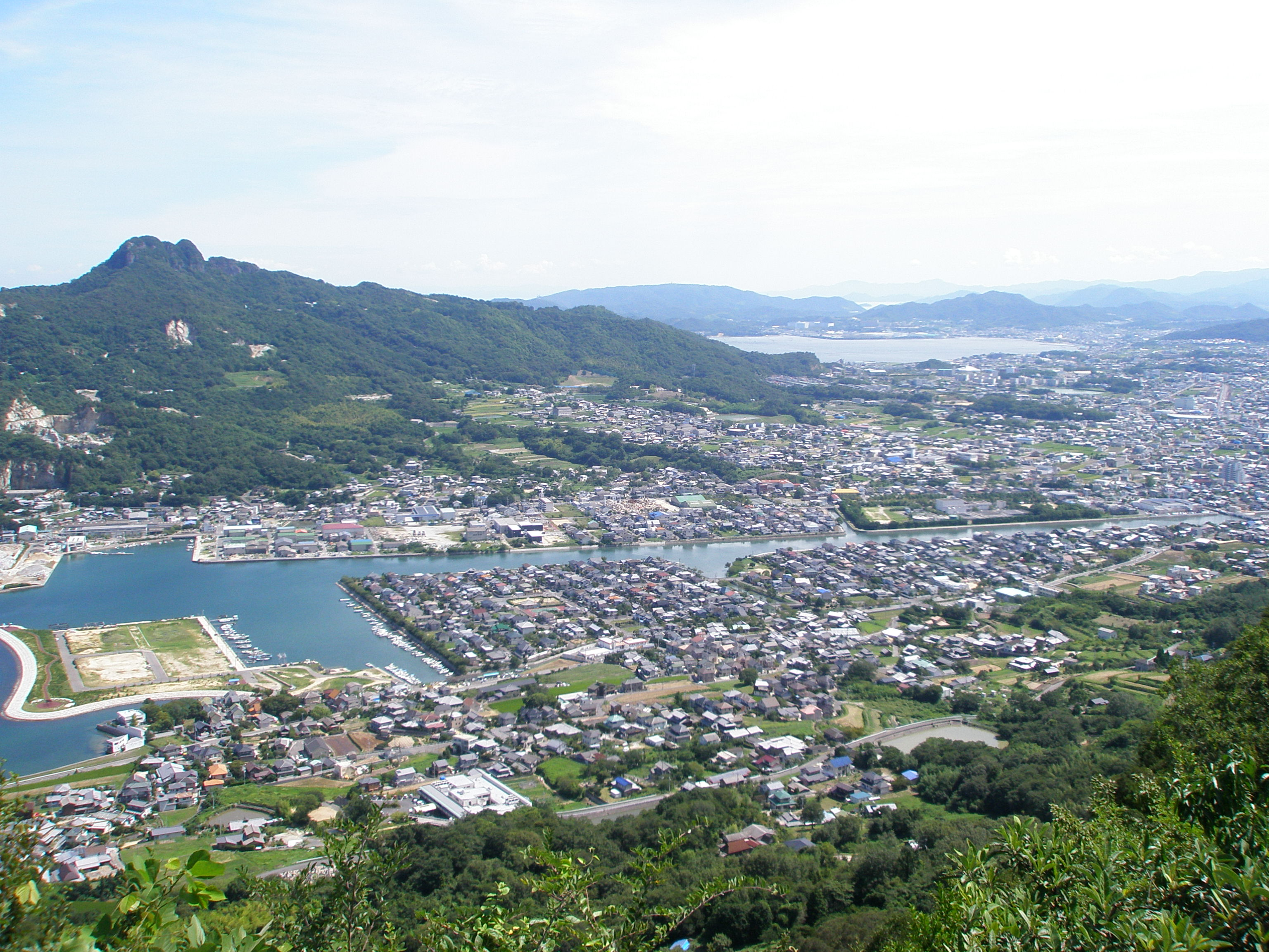 談古嶺(八栗寺方面)